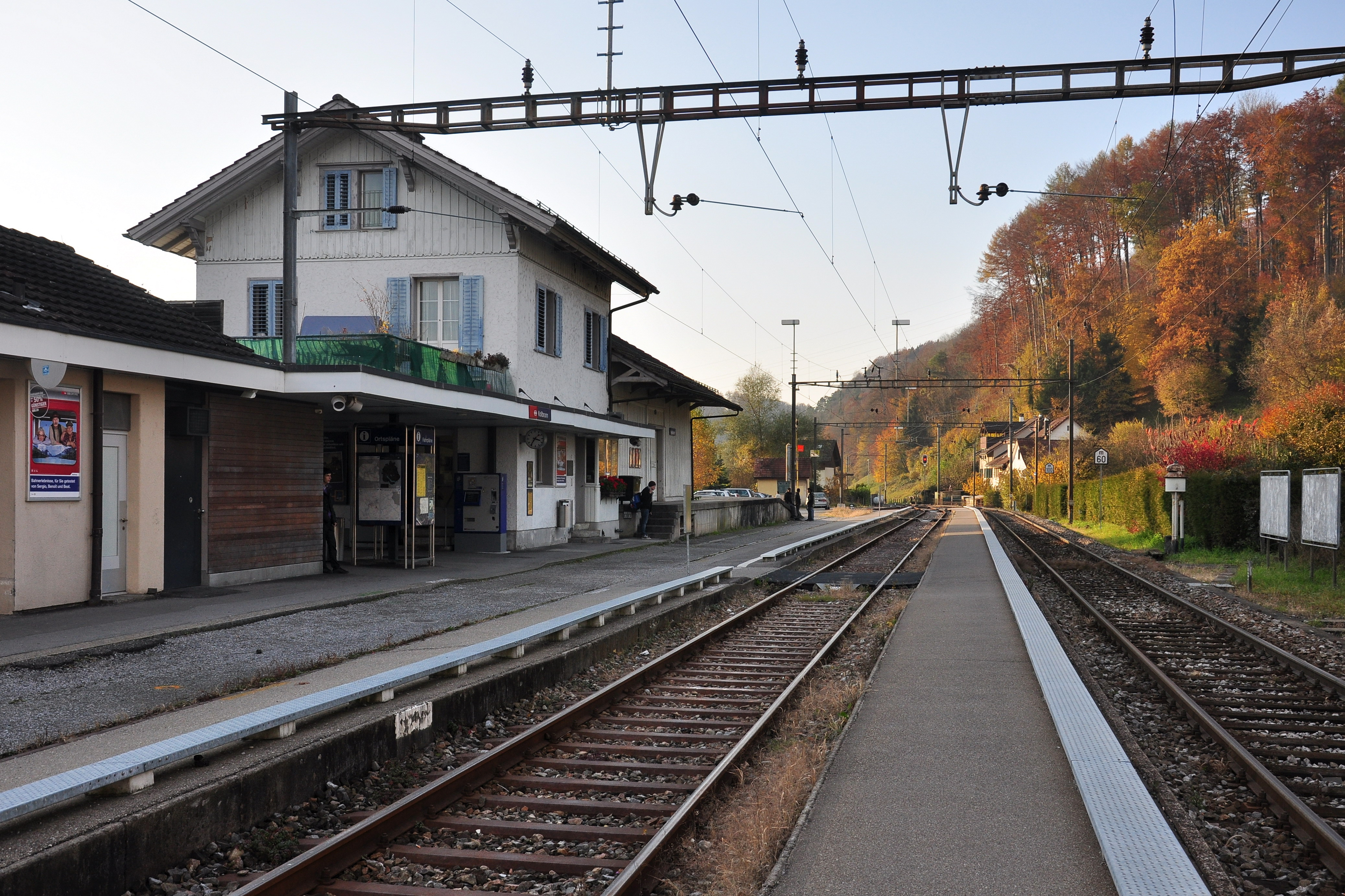 Kollbrunn (Switzerland)